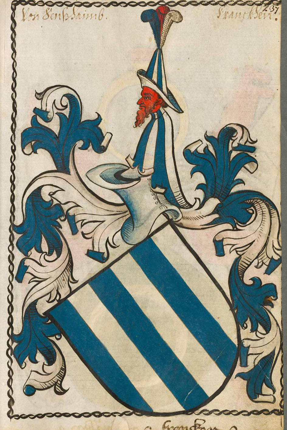 Scheibler'sches Wappenbuch , älterer Teil Von Senßhaimb Franckhen